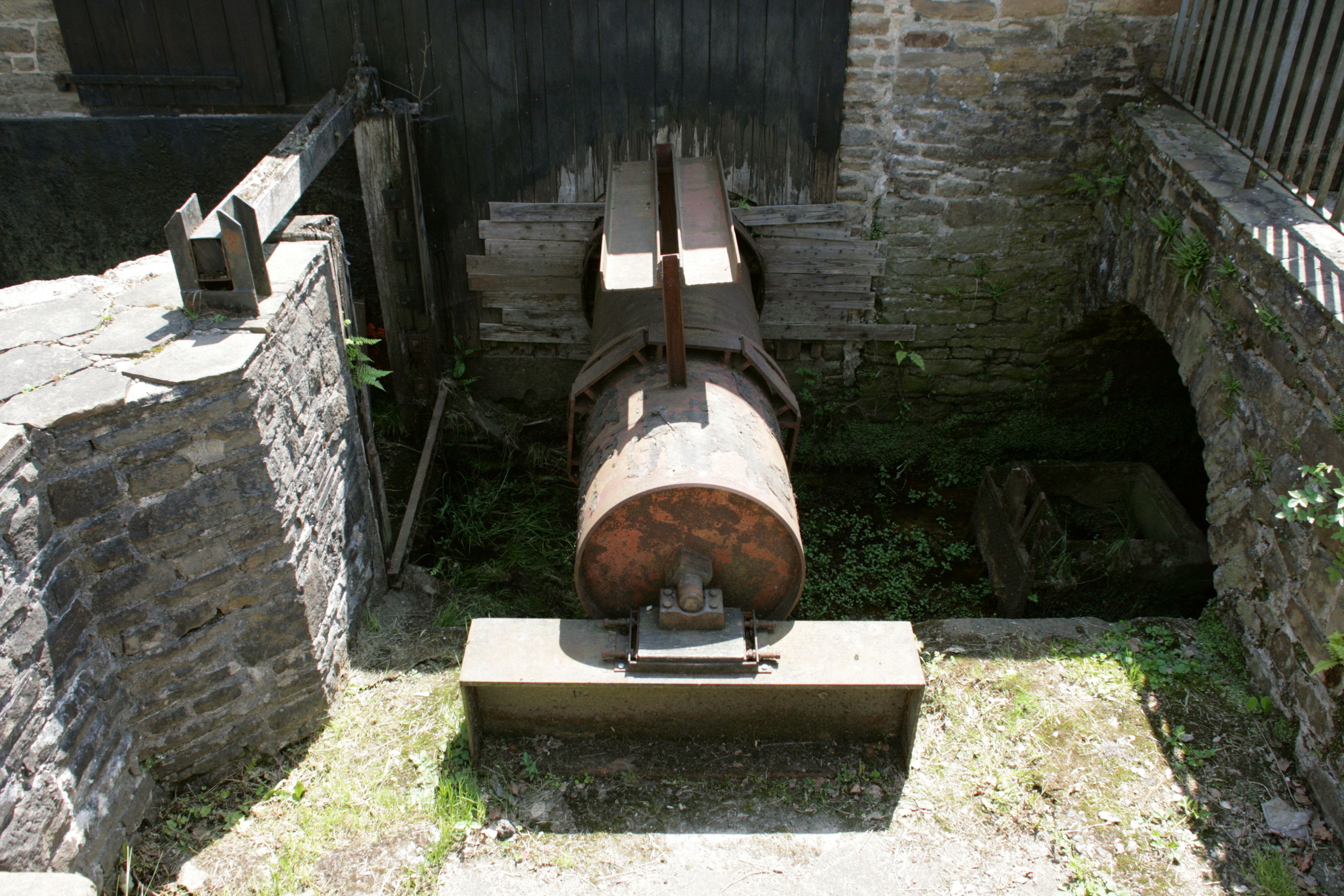 Deilbachhammer, Eisenhammerweg in Essen-Kupferdreh